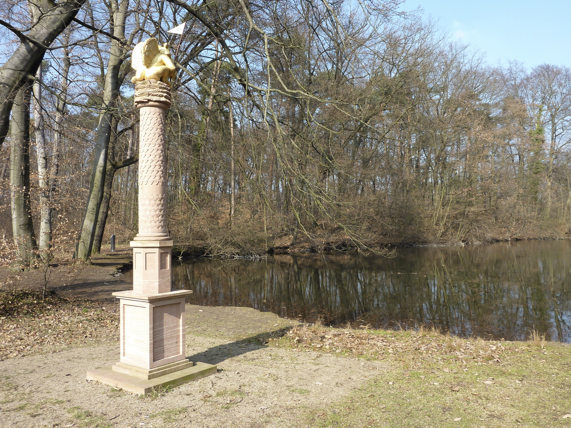 Der Tiroler Weiher ist ein Teich auf dem Gebiet der hessischen Stadt Frankfurt am Main. Das Stillgewässer liegt südlich des Flusses Main im Frankfurter Stadtwald. Der Tiroler Weiher gehört zum Stadtteil Sachsenhausen und befindet sich nahe der Stadtteilgrenze zum westlich davon gelegenen Frankfurt-Niederrad. Er wurde Ende der 1950er-Jahre künstlich angelegt, um den Grundwasserspiegel im Stadtwald zu regulieren. Das Foto zeigt die einer römischen Jupitersäule nachempfundene Skulptur am Ufer. Die Skulptur von Bildhauer Andreas Rohrbach besteht aus einer Säule aus rotem Sandstein sowie einer darauf sitzenden vergoldeten Figur. Die Figur stellt das vom Frankfurter Zeichner und Autor Robert Gernhardt entworfene Frankfurter Grüngürteltier dar